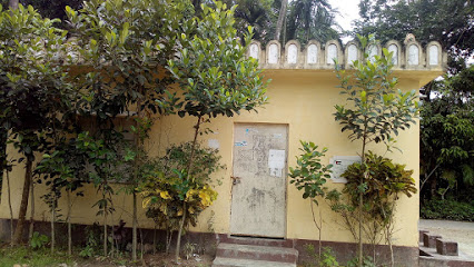 আবিরনগর মাহমুদিয়া মাদ্রাসার দপ্তর ভবন